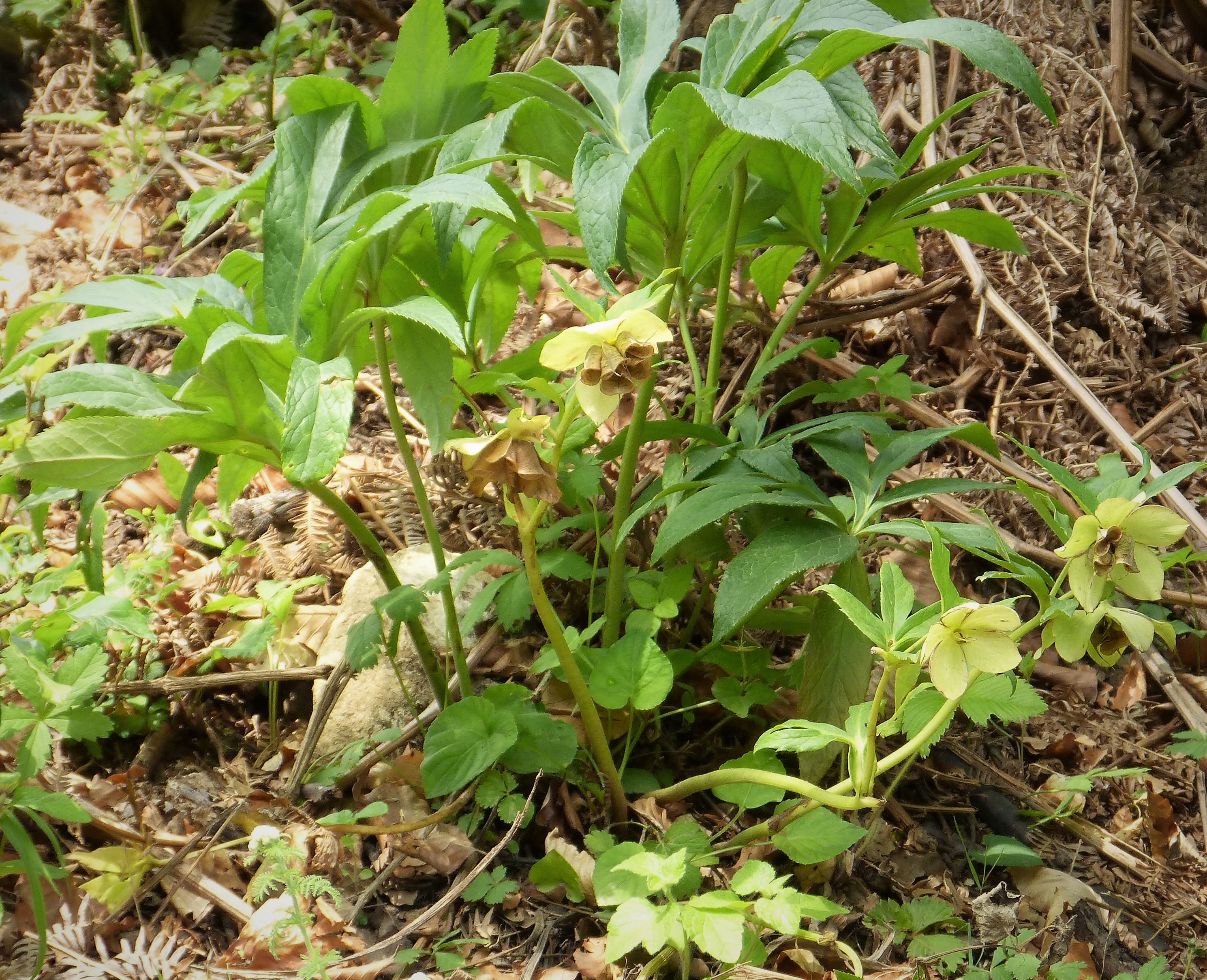 Valbona National Park Albanian Alps